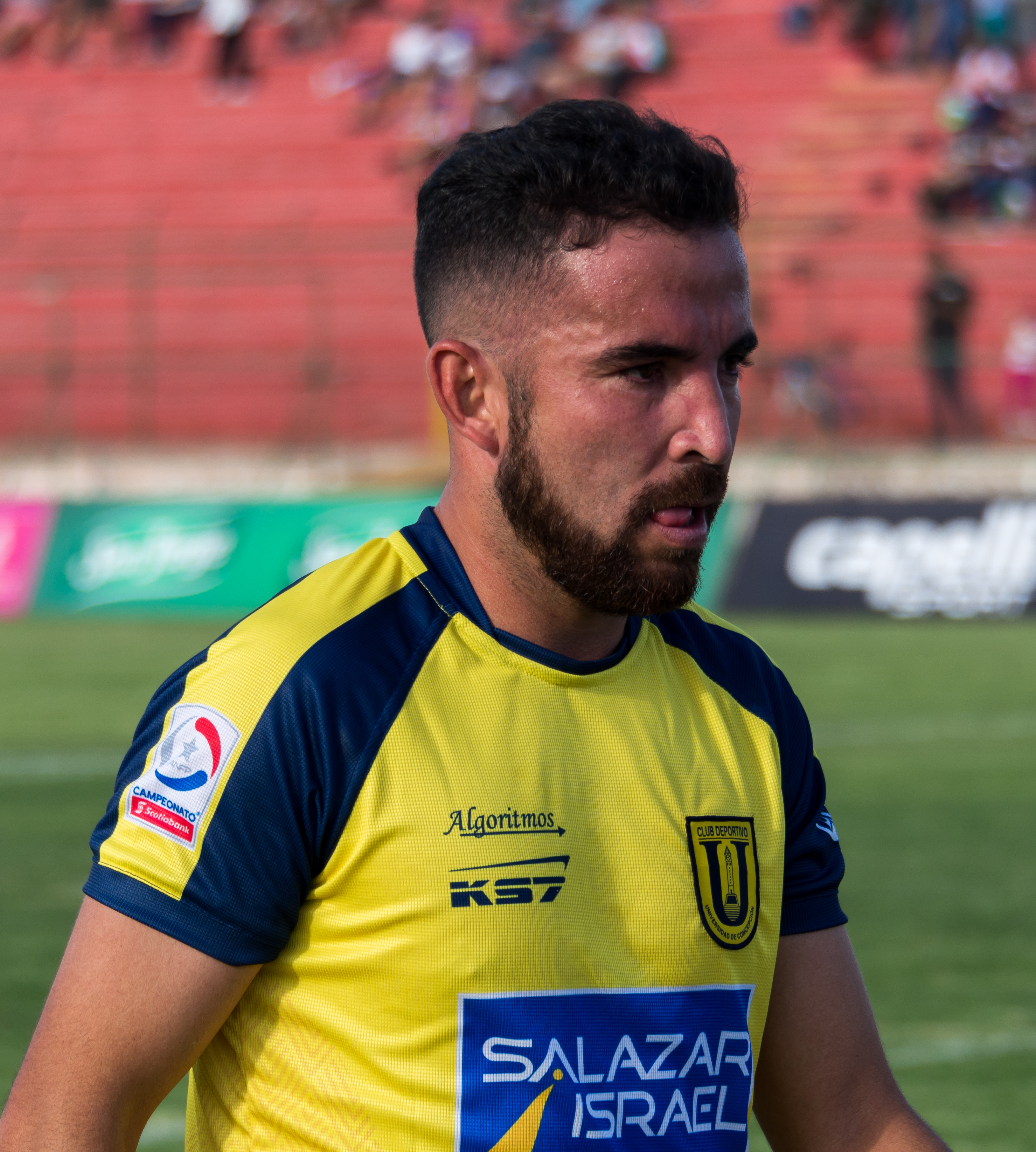 Fernando Cordero, Palestino v Universidad de Concepción, Estadio Municipal de La Cisterna, La Cisterna, Santiago, Región Metropolitana, Chile.